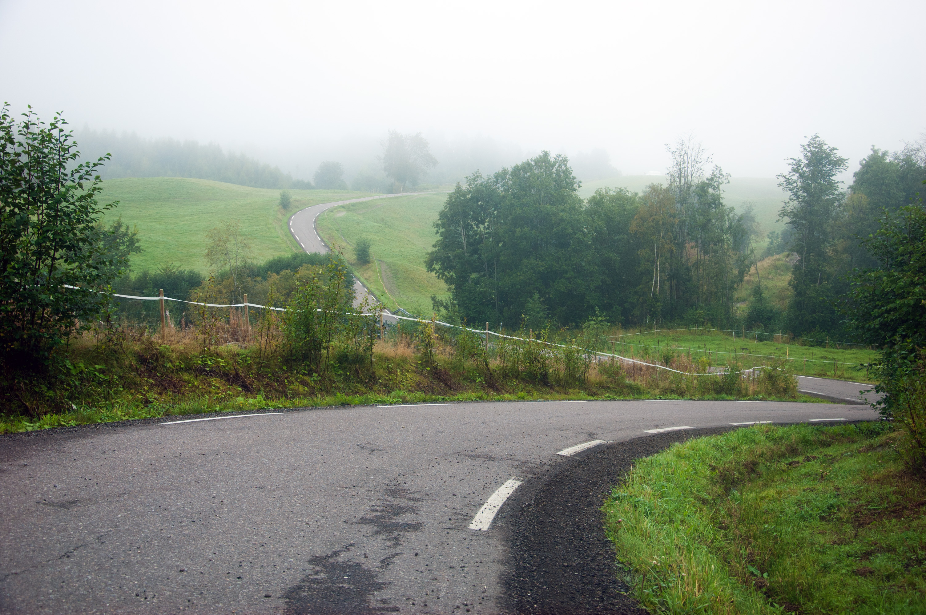 Fylkesvei 665 Kåpeveien ved Dal i Re kommune, Vestfold